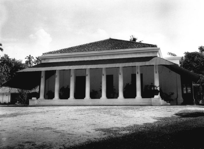 Foto. Rumah dinas residen Lampung di Telukbetung, Sumatera Selatan.